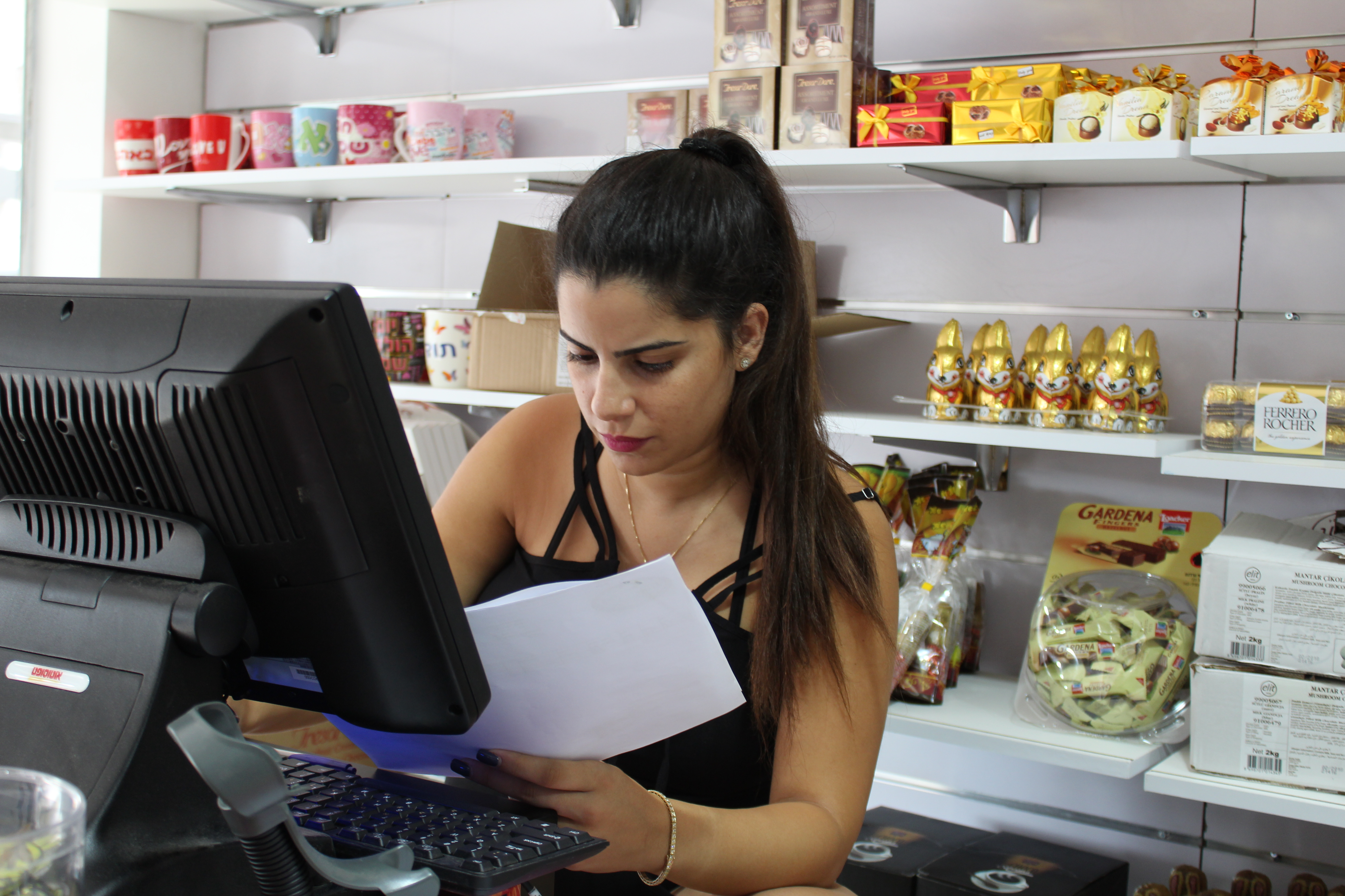 קופאית צילום תיכון רוטברג